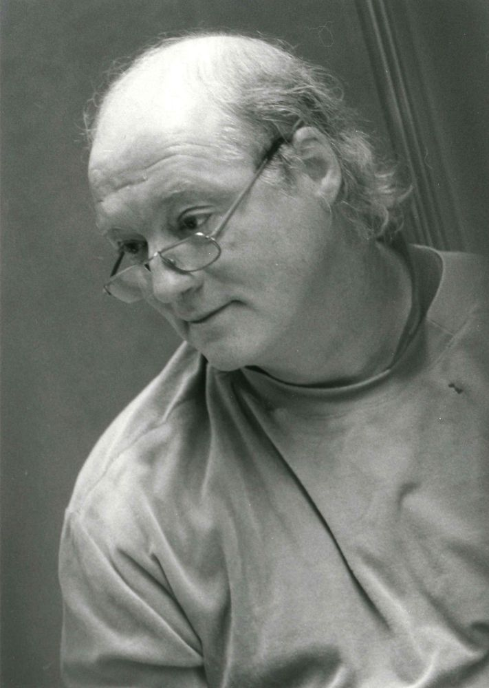 Ulrich Wildgruber im Hörspielstudio in einer Aufnahme des Berliner Fotografen Werner Bethsold.